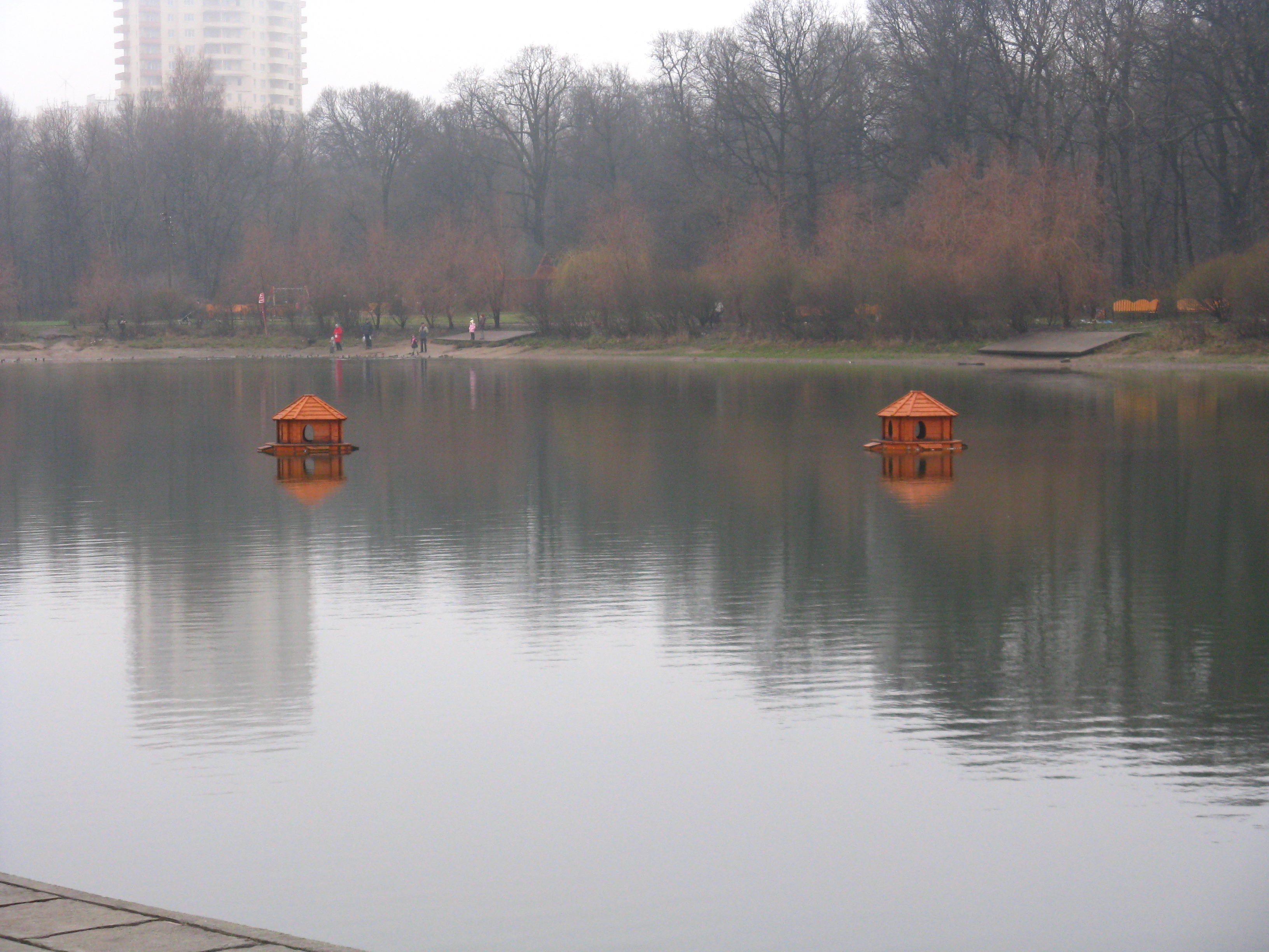 Кормушки